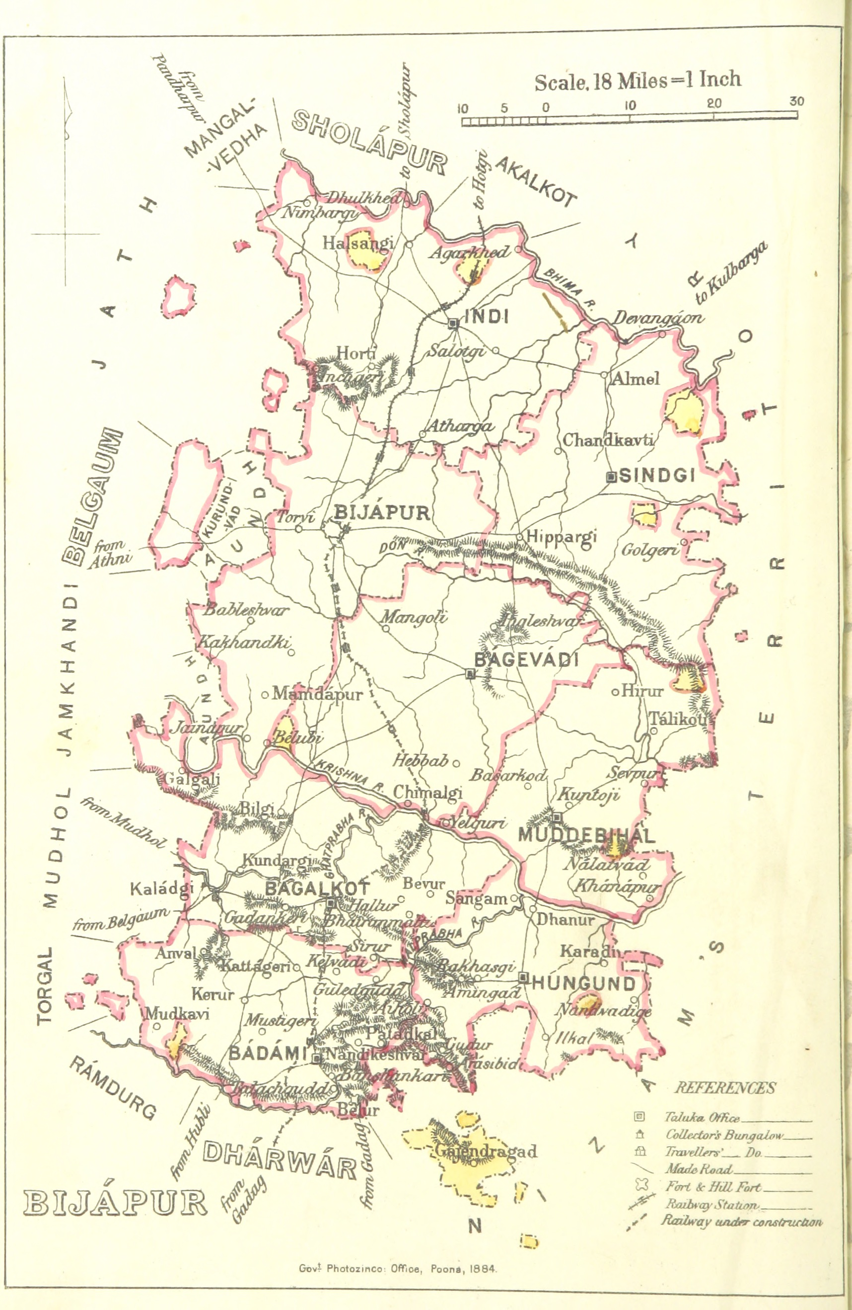 Bijapur district 1896